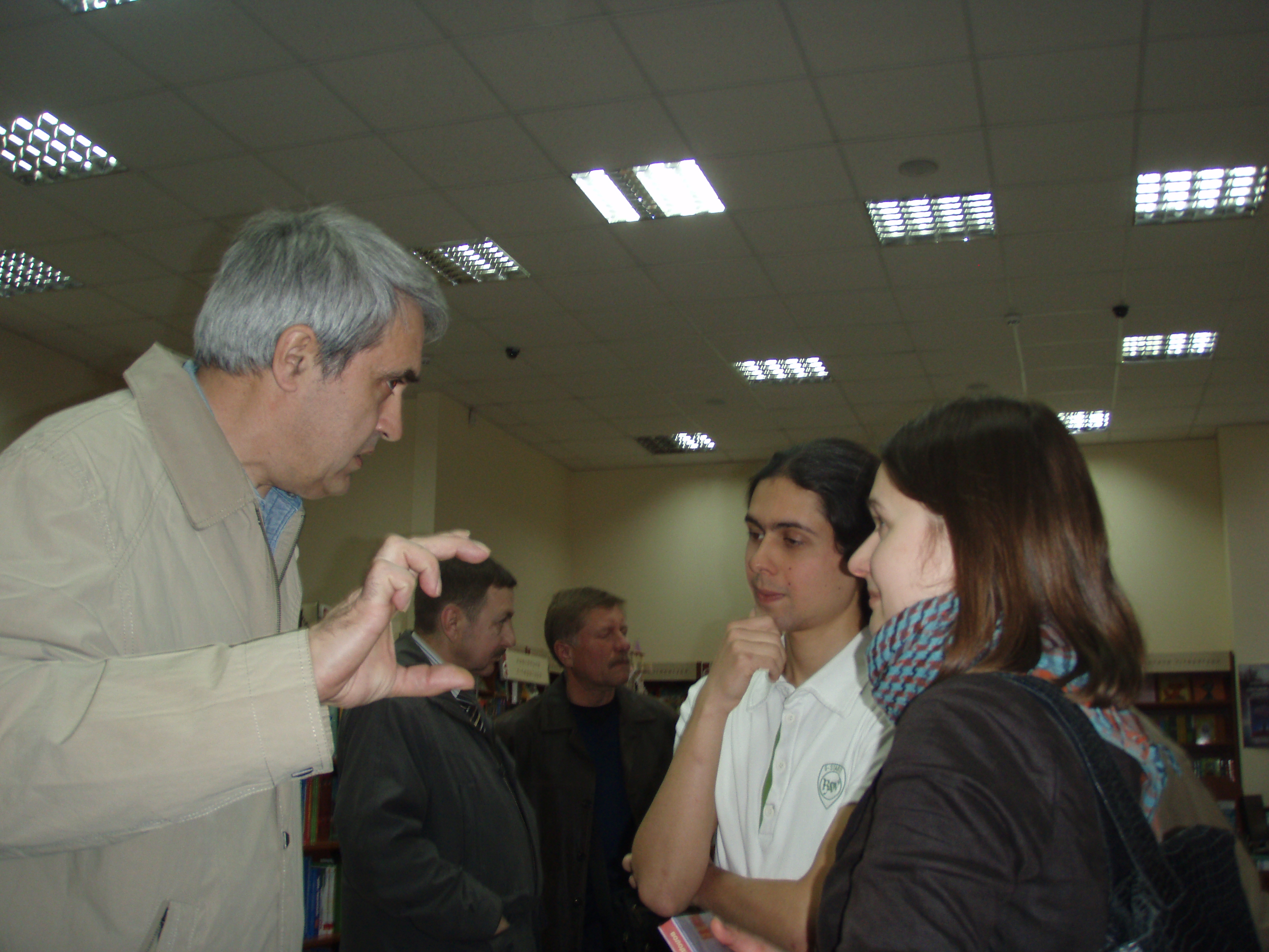 Український письменник Володимир Дмитренко спілкується з читачами